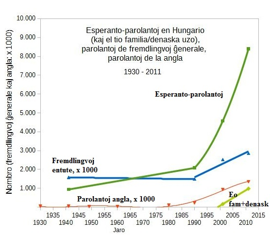 Nombro de Esperanto-parolantoj en Hungario; homoj kun Esperanto kiel familia aŭ denaska lingvo; sumo de lingvo-scio; homoj parolantaj la anglan